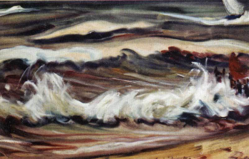 Die Welle